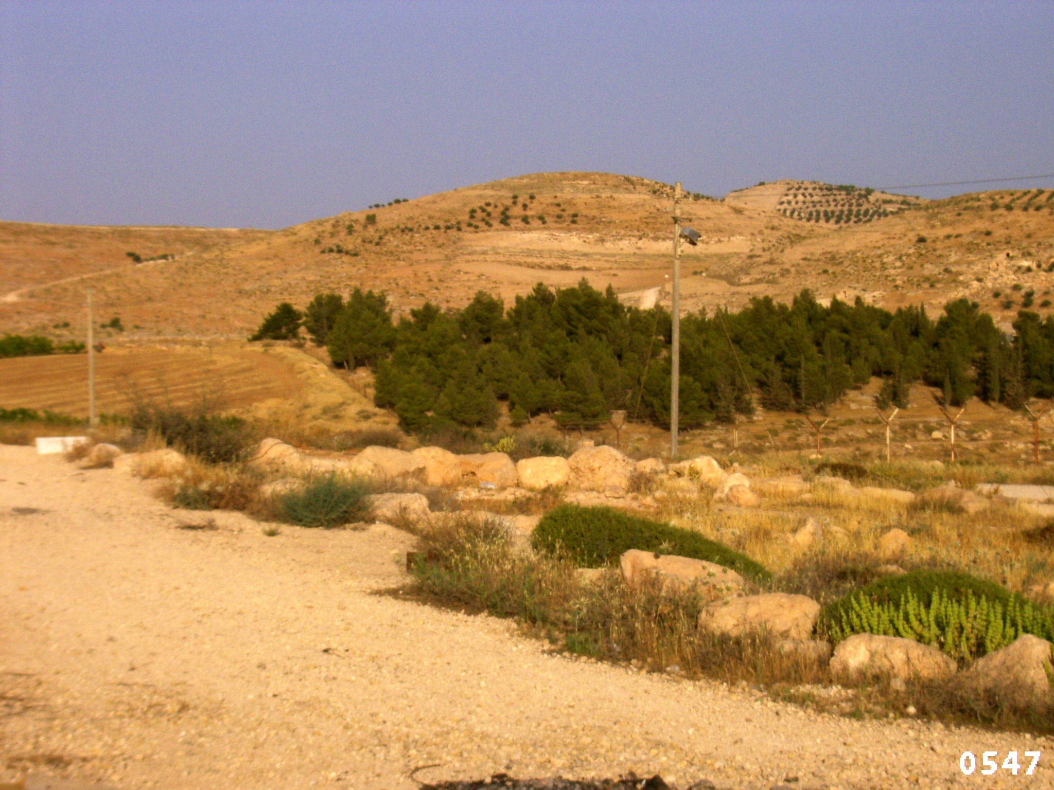 home a maon